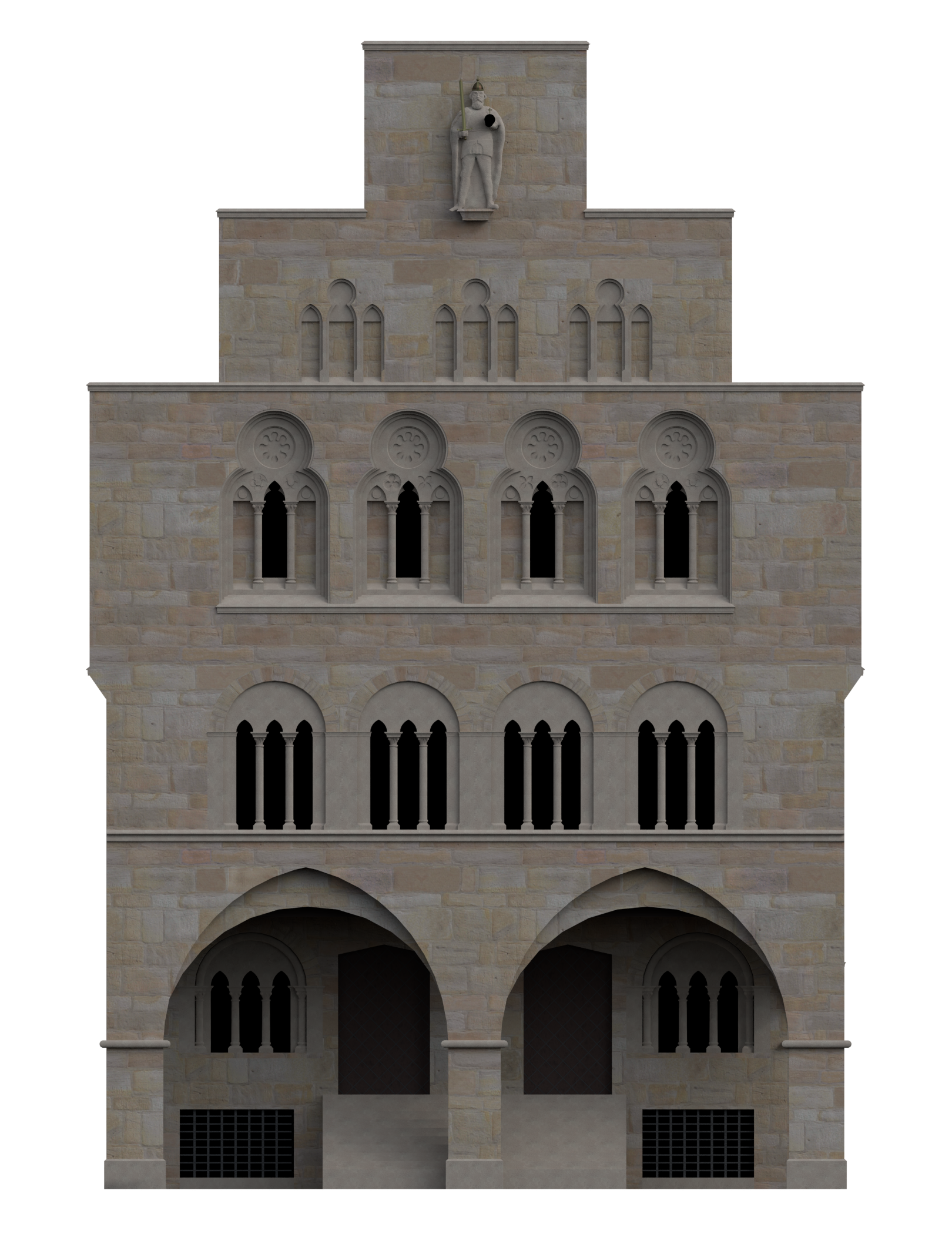 Rekonstruktion der marktseitigen Giebels des alten Dortmunder Rathauses um 1240 nach Skizzen von Eberhard G. Neumann.